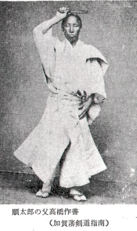 a Japanese man 高橋荘兵衛 (Soubei Takahashi)